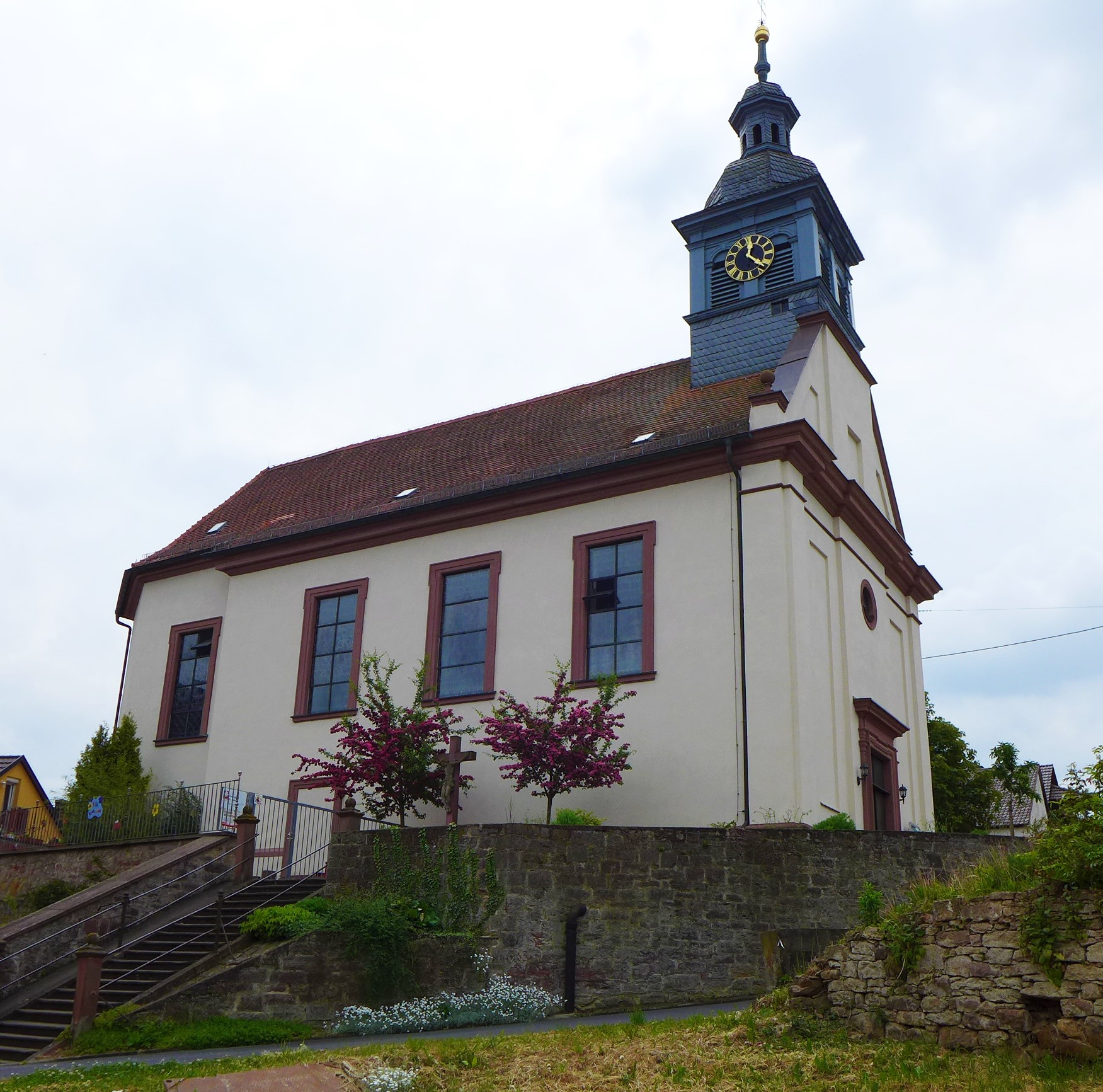 St. Ägidius (Holzkirchhausen), Außenansicht